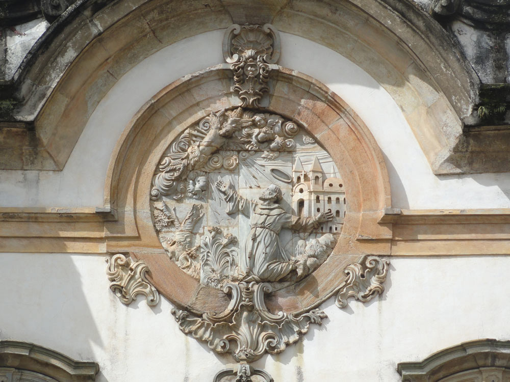 Relevo no óculo da Igreja de S. Francisco, Ouro Preto, obra de Aleijadinho.